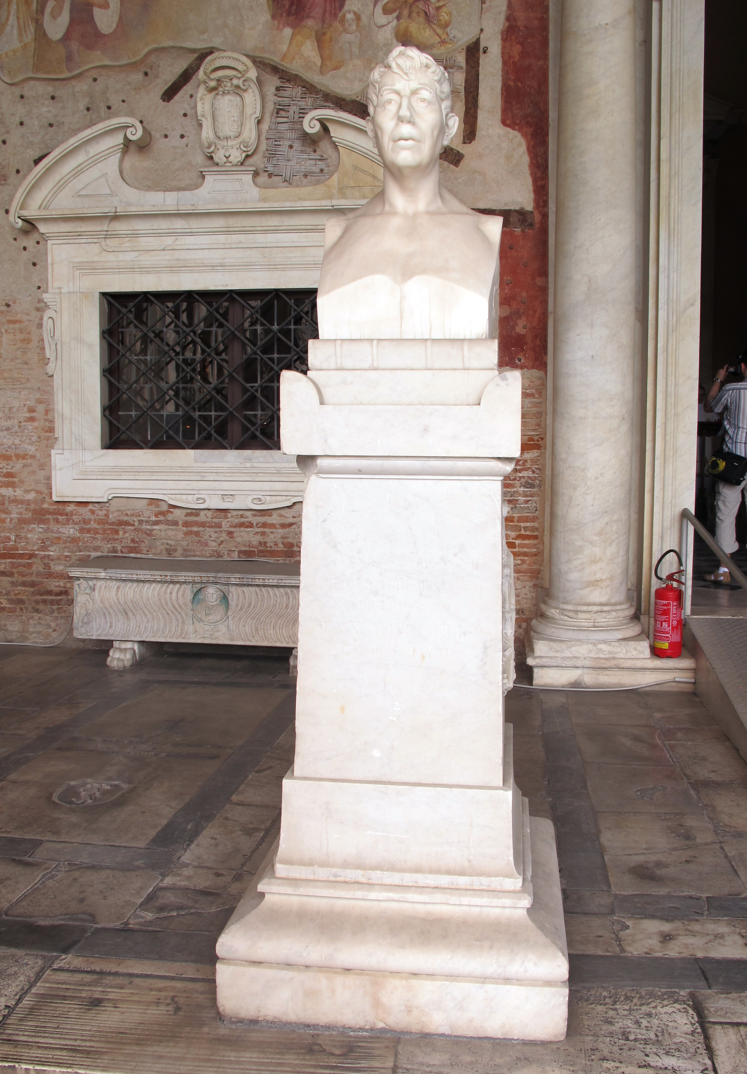 Monumento a giovanni carmignani (1868)